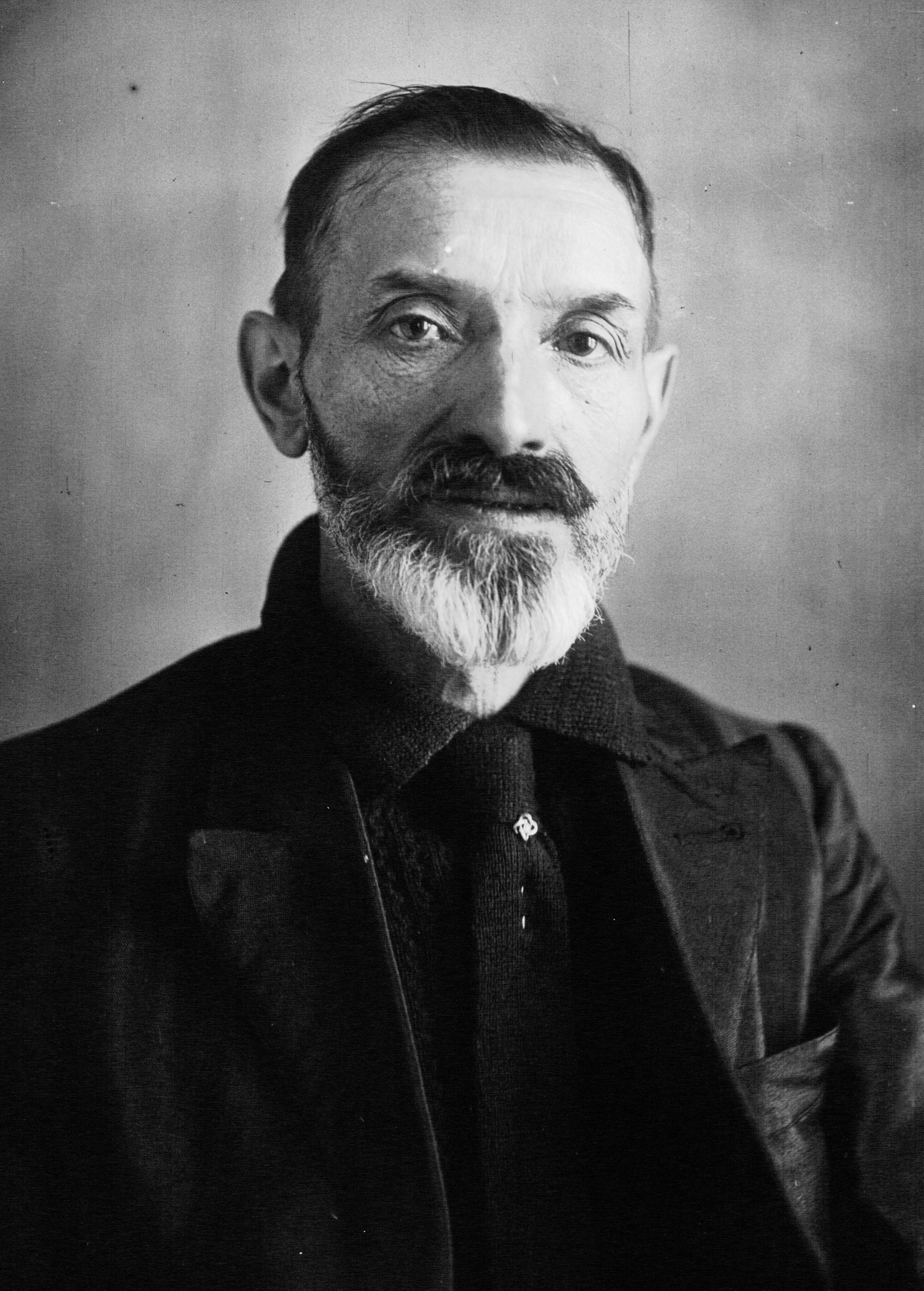 Arsène Millocheau lors de Paris-Brest-Paris 1921. Il a alors 54 ans.